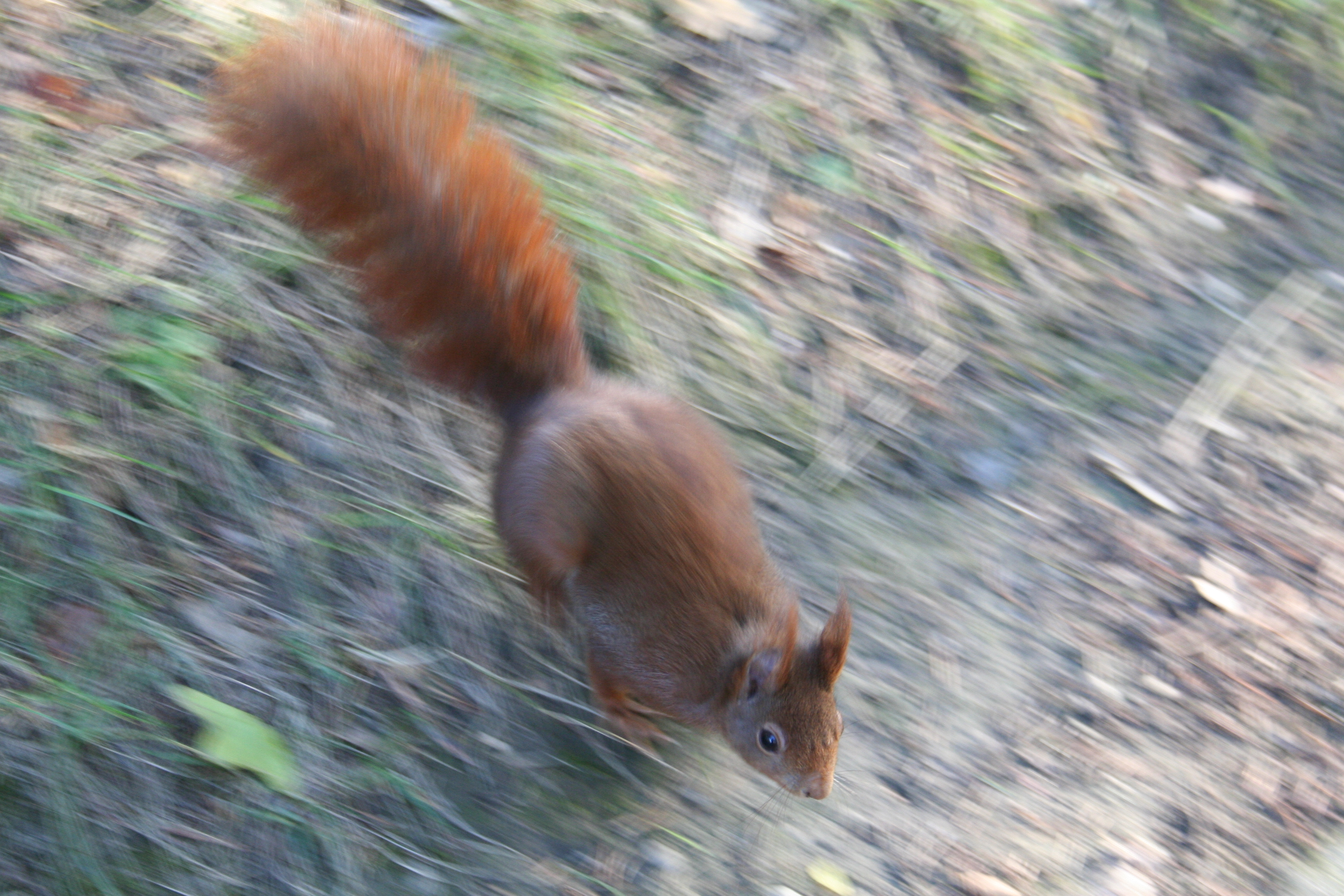 ecureuil roux qui court. Pris au parc de la tête d'or à lyon